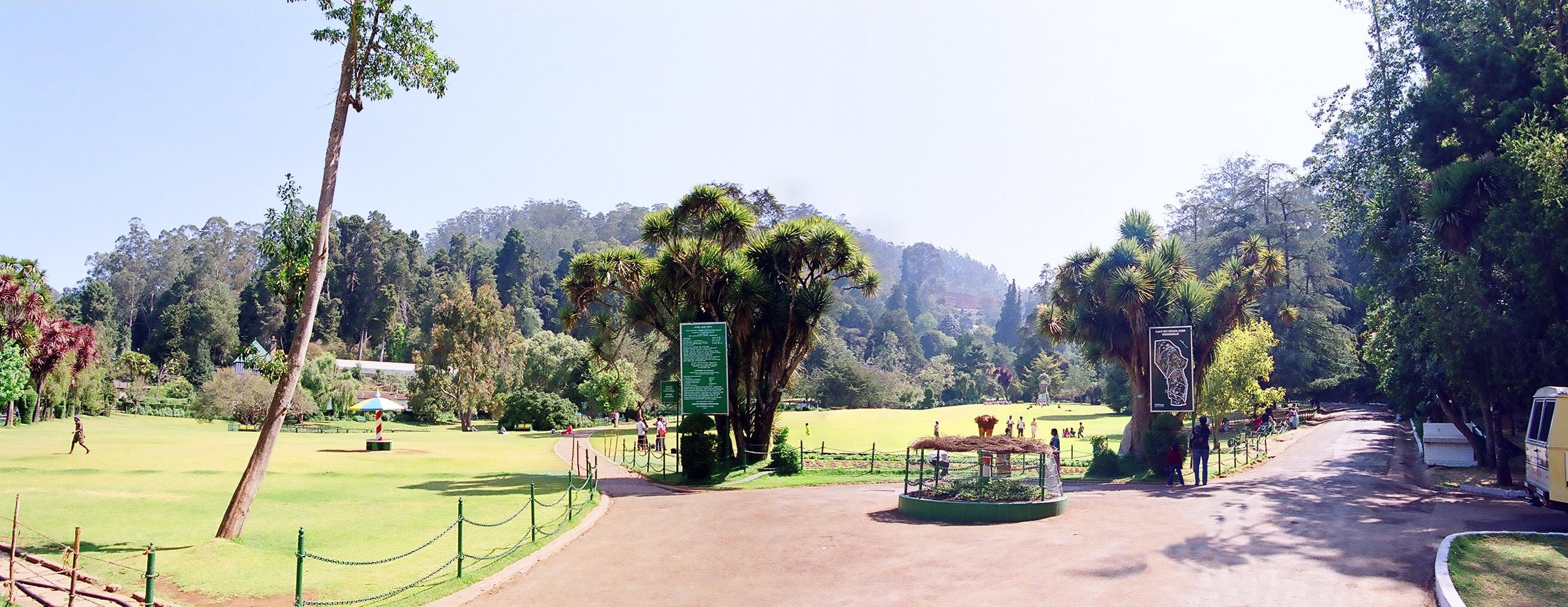 Ooty Botanical Gardens, Udagamandalam, Nilgiris